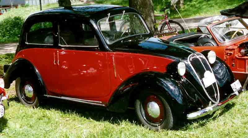 Fiat 508C Balilla Berlina 1939